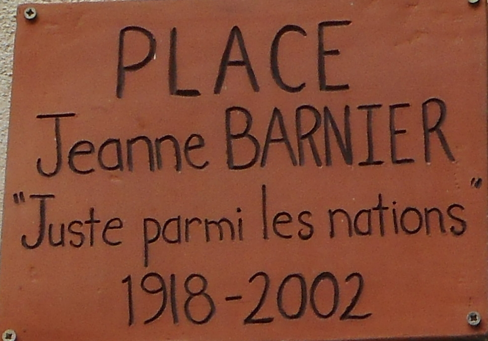 Plaque de la place Jeanne Barnier à Dieulefit (Drôme)